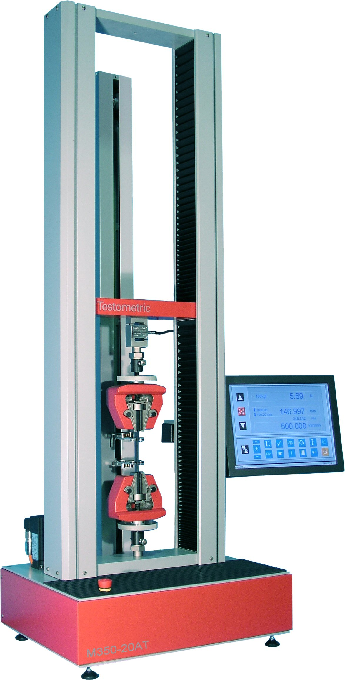 Universele trek - en drukbank 20 kN